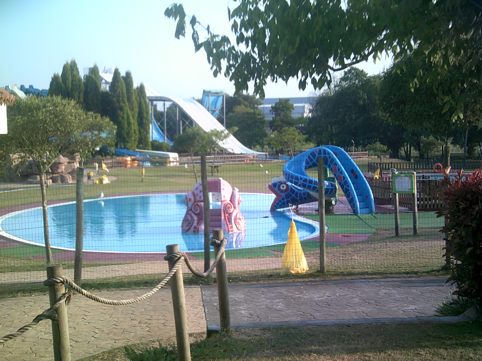 Ver título.